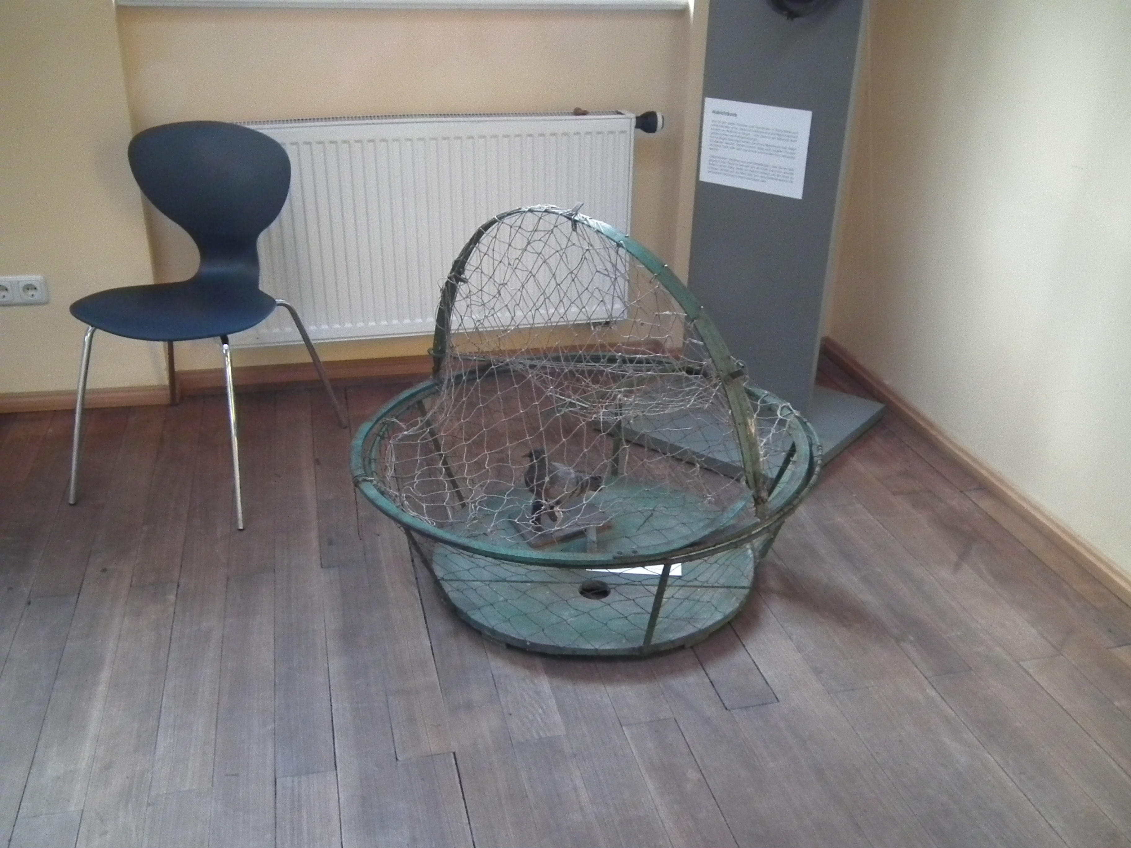 Altenburg Mauritianum